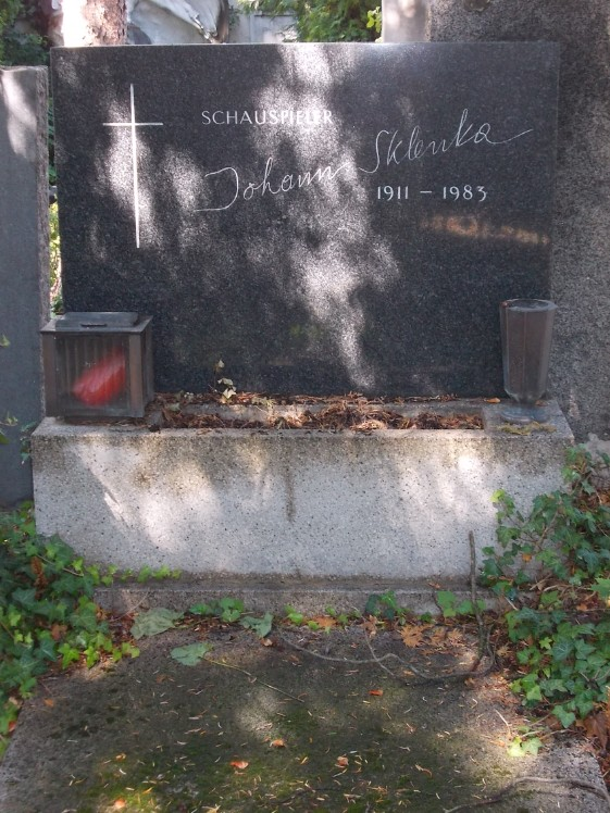 Grab Johann Sklenka-Helenenfriedhof Baden